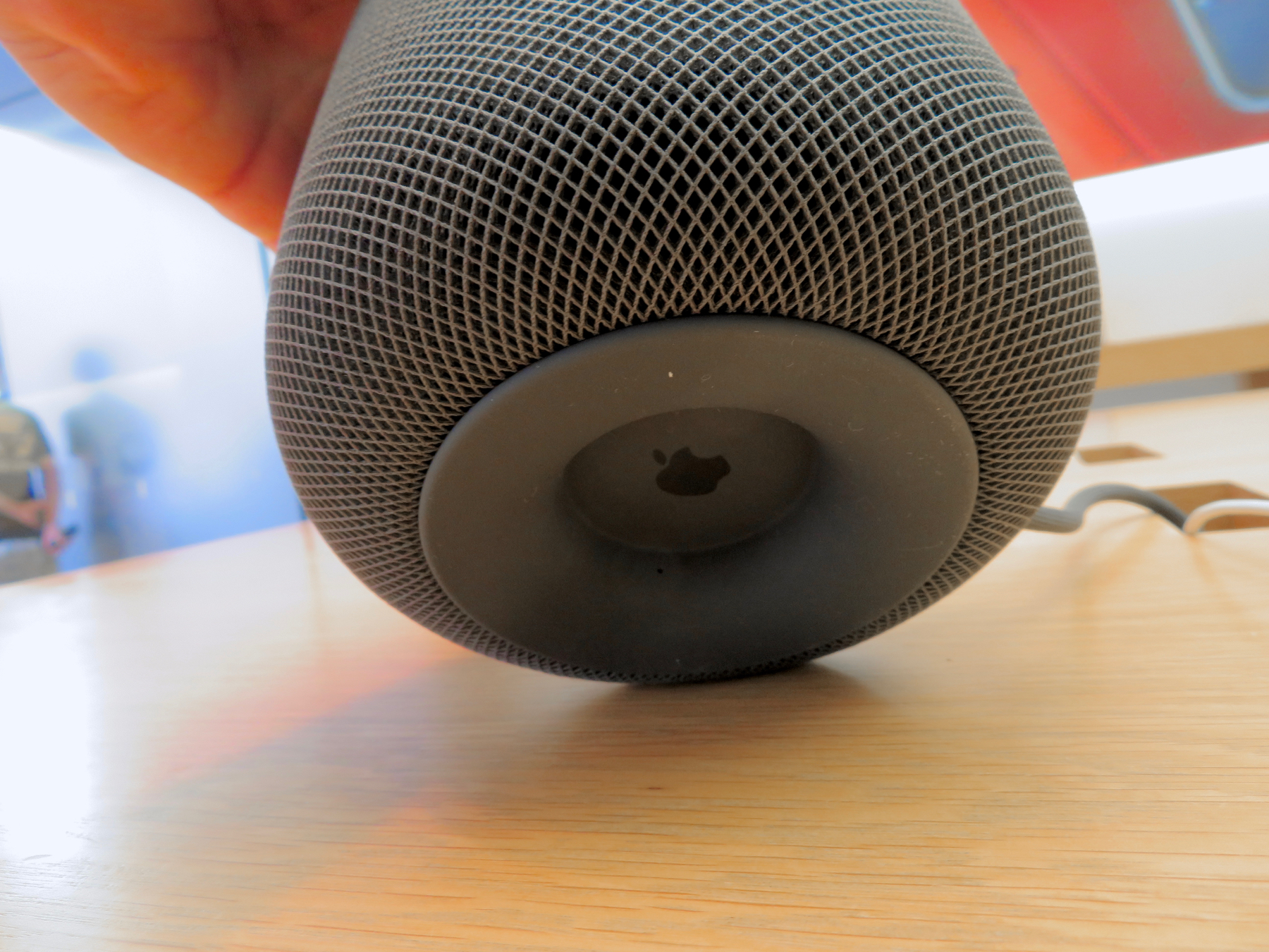 HomePod底部のアップルマーク。